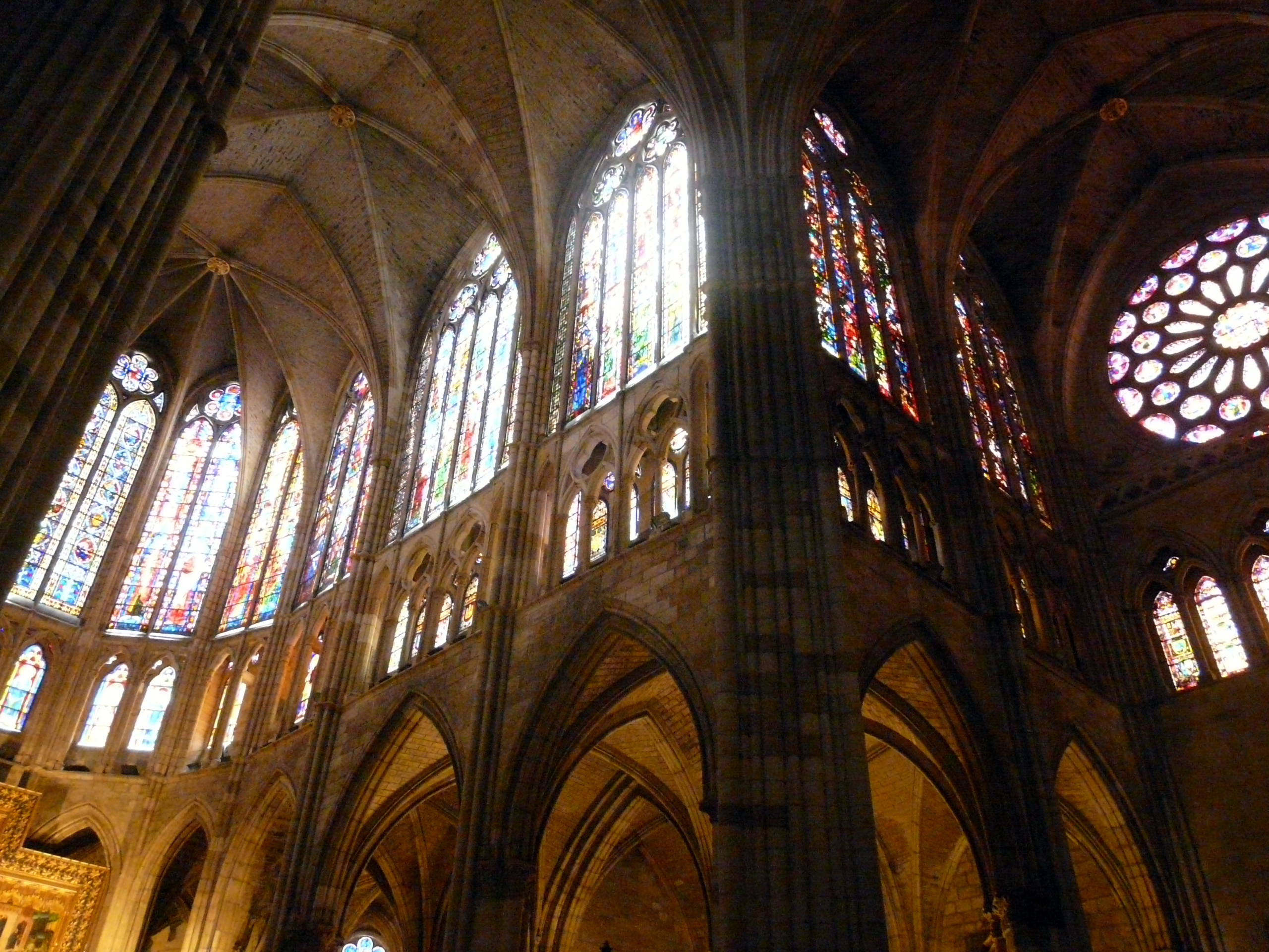 Vidrieras en la cabecera y crucero sur, catedral de León